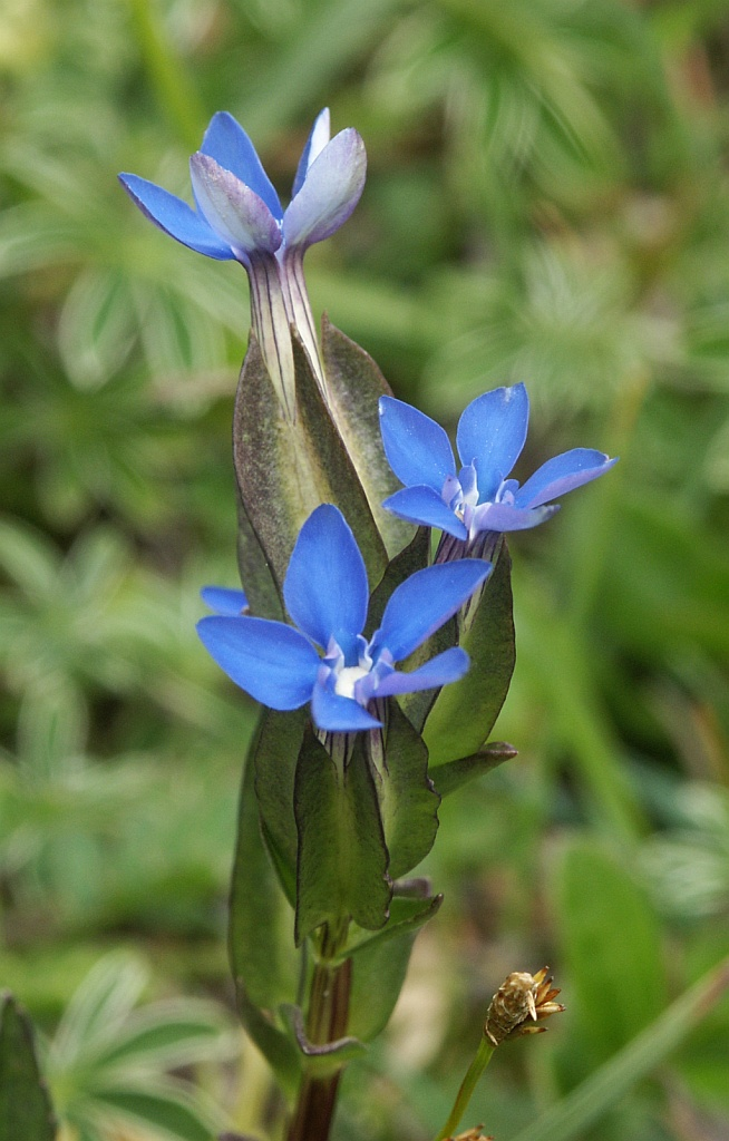 Gentiana utriculosa, Tannheimer Berge, Austria